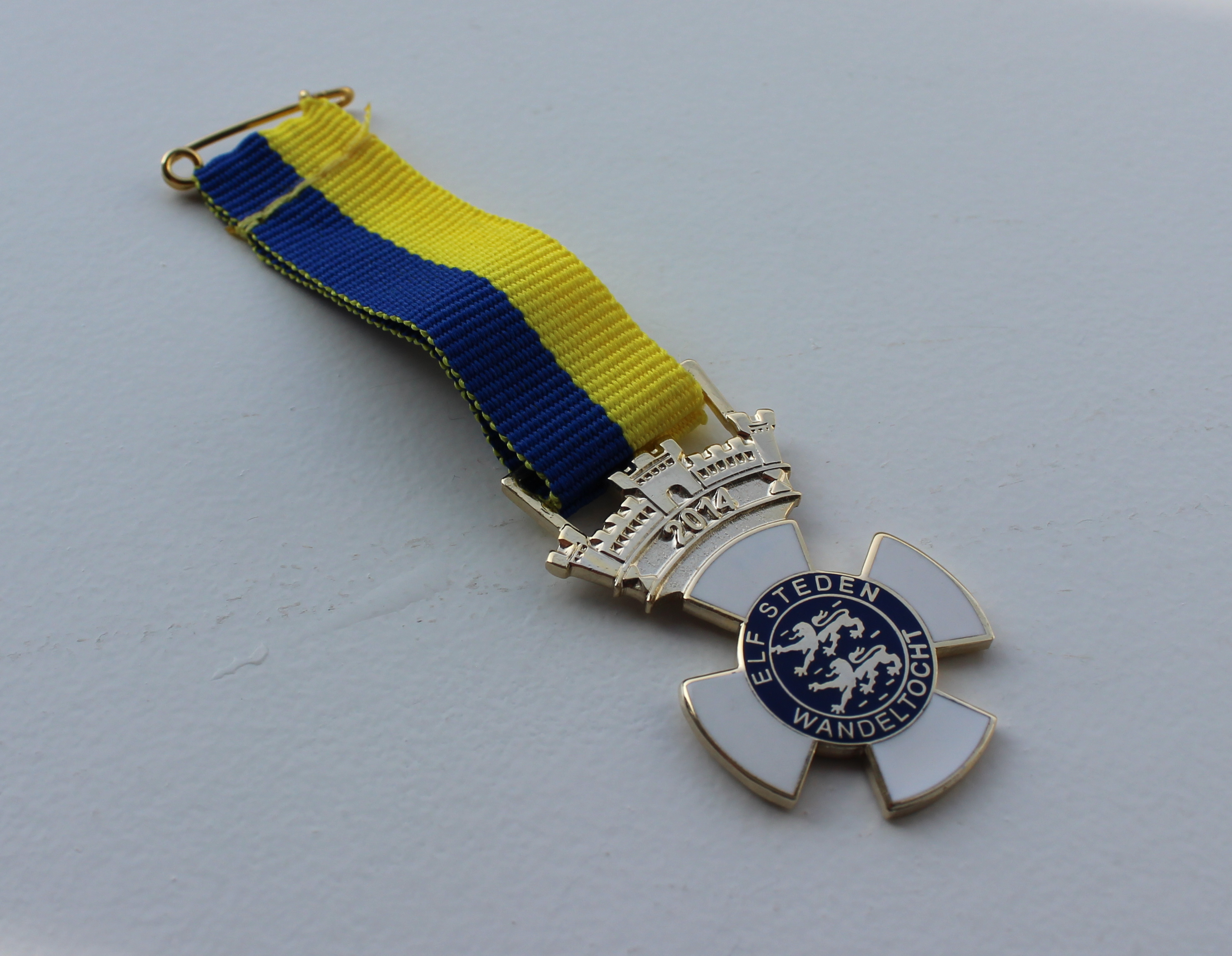 Het Elfstedenwandelkruisje, met het wapen van de provincie Friesland